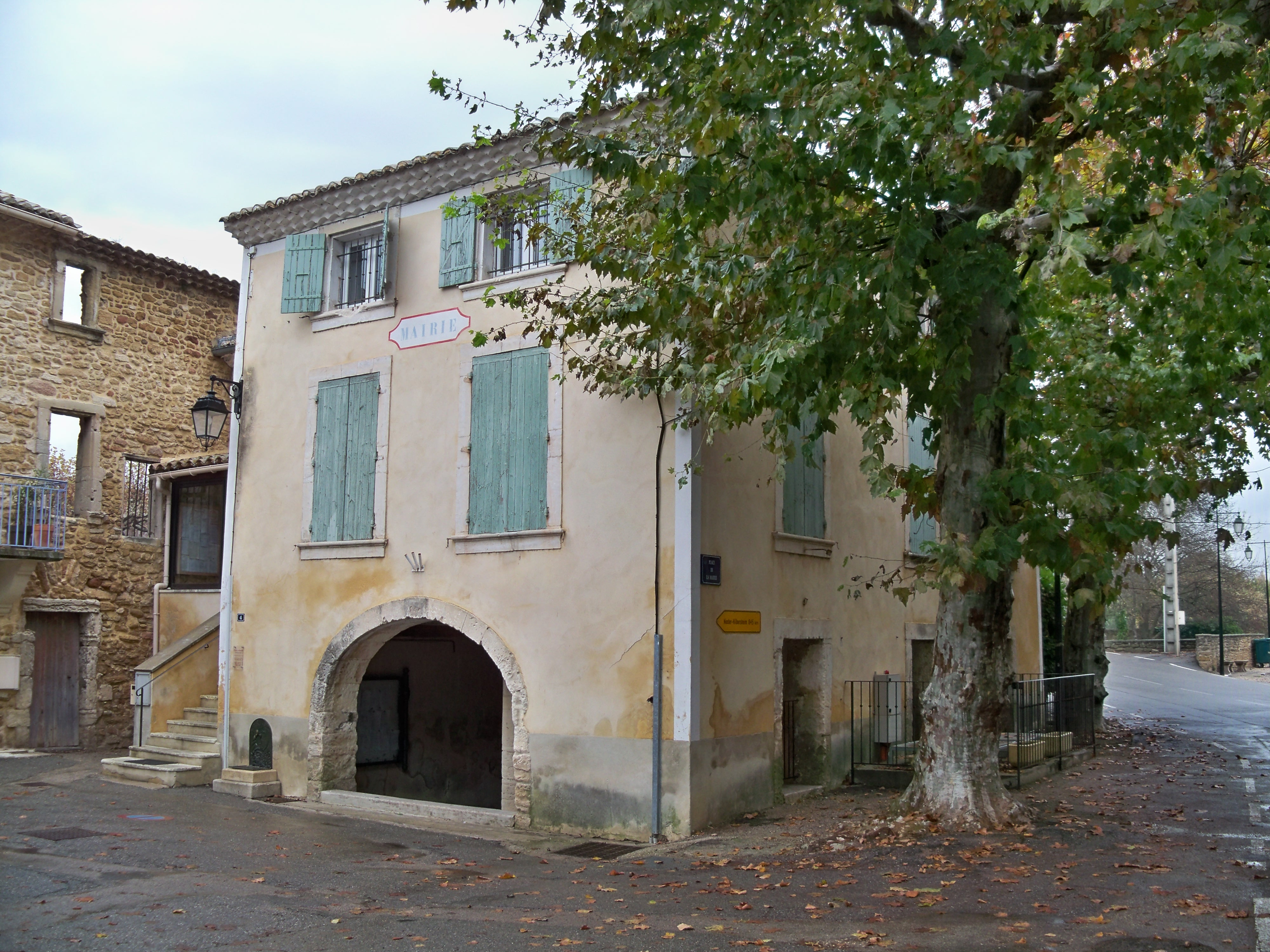 mairie de Bouchet (26)